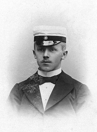 Anders Roland (1879-1926)